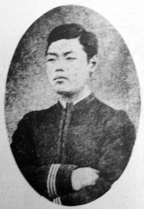 a Japanese man 津田三蔵 (Sanzo Tsuda)